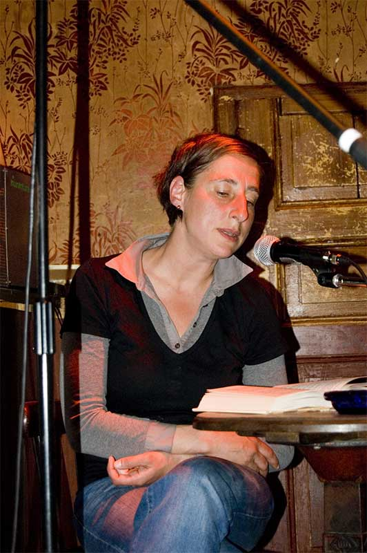 Judith Hermann am 24. April 2007 im Kaffee Burger (Berlin-Mitte) bei der Benefiz-Lesung Krankenhaus später für Michael Stein